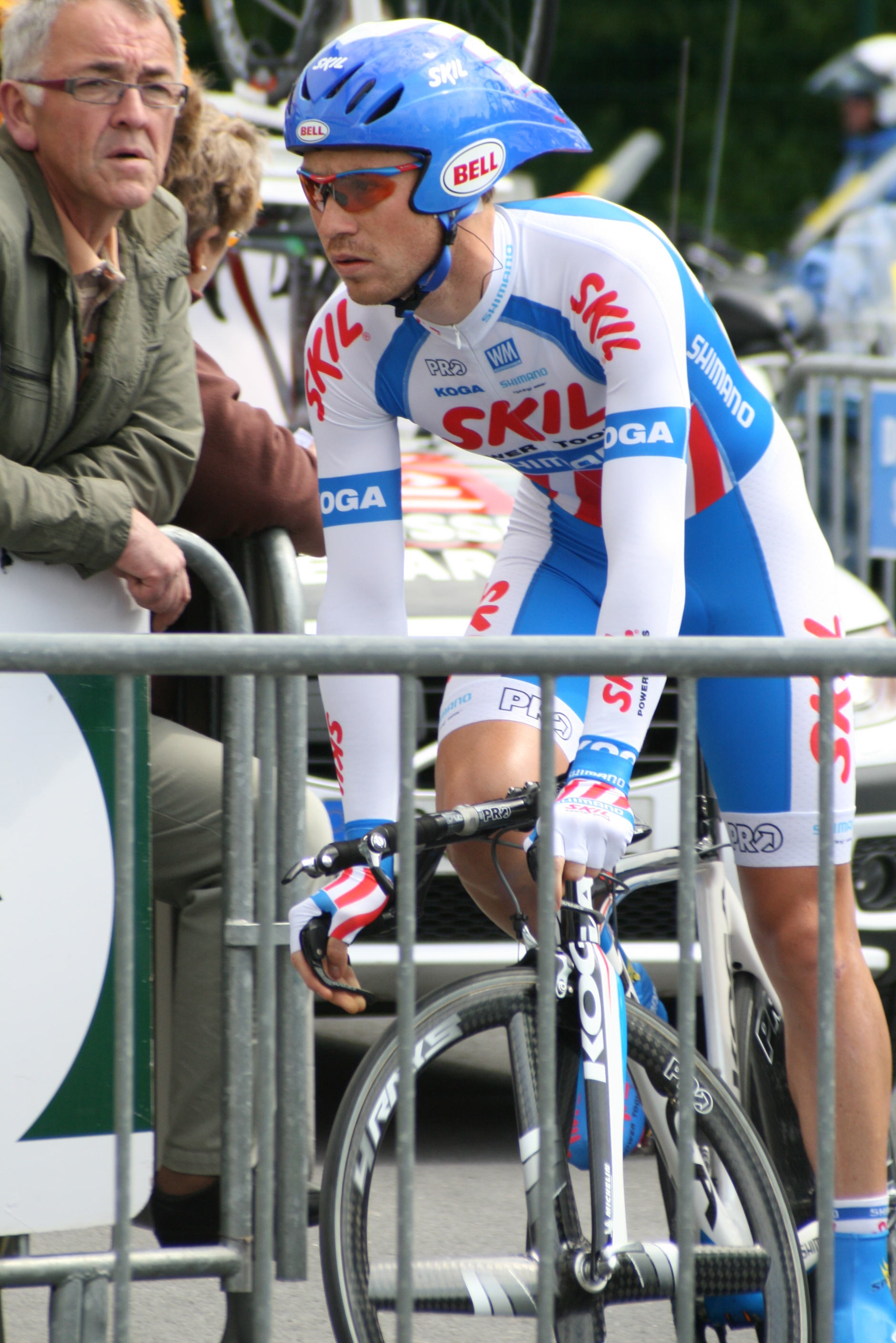 Mitchell Docker, durant les Quatre jours de Dunkerque 2009, à Douai